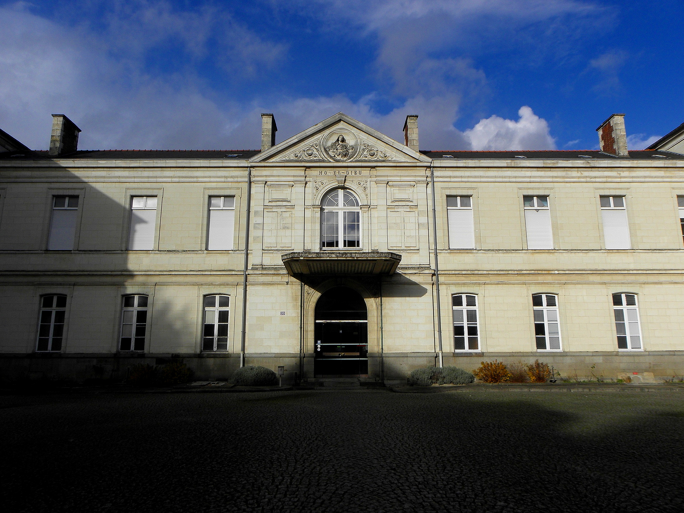 Hôtel-Dieu de Rennes (35).